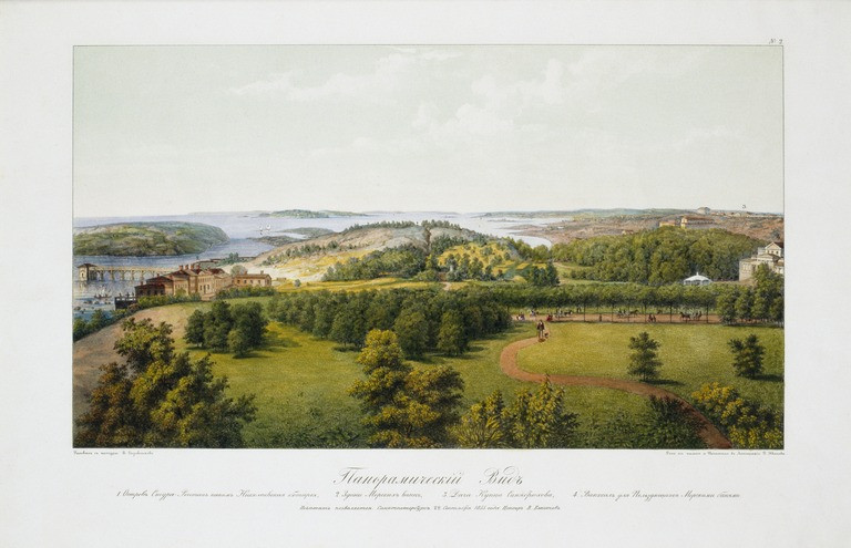 Näkymä Jusupovin huvilasta lounaaseen. Vasemmalla Ullanlinnan kylpylaitos ja sen takana Harakka, oikeassa reunassa näkyvissä osa Kaivohuonetta. Keskellä laaja puistoalue käytävineen. Isolla Puistotiellä vilkas liikenne.